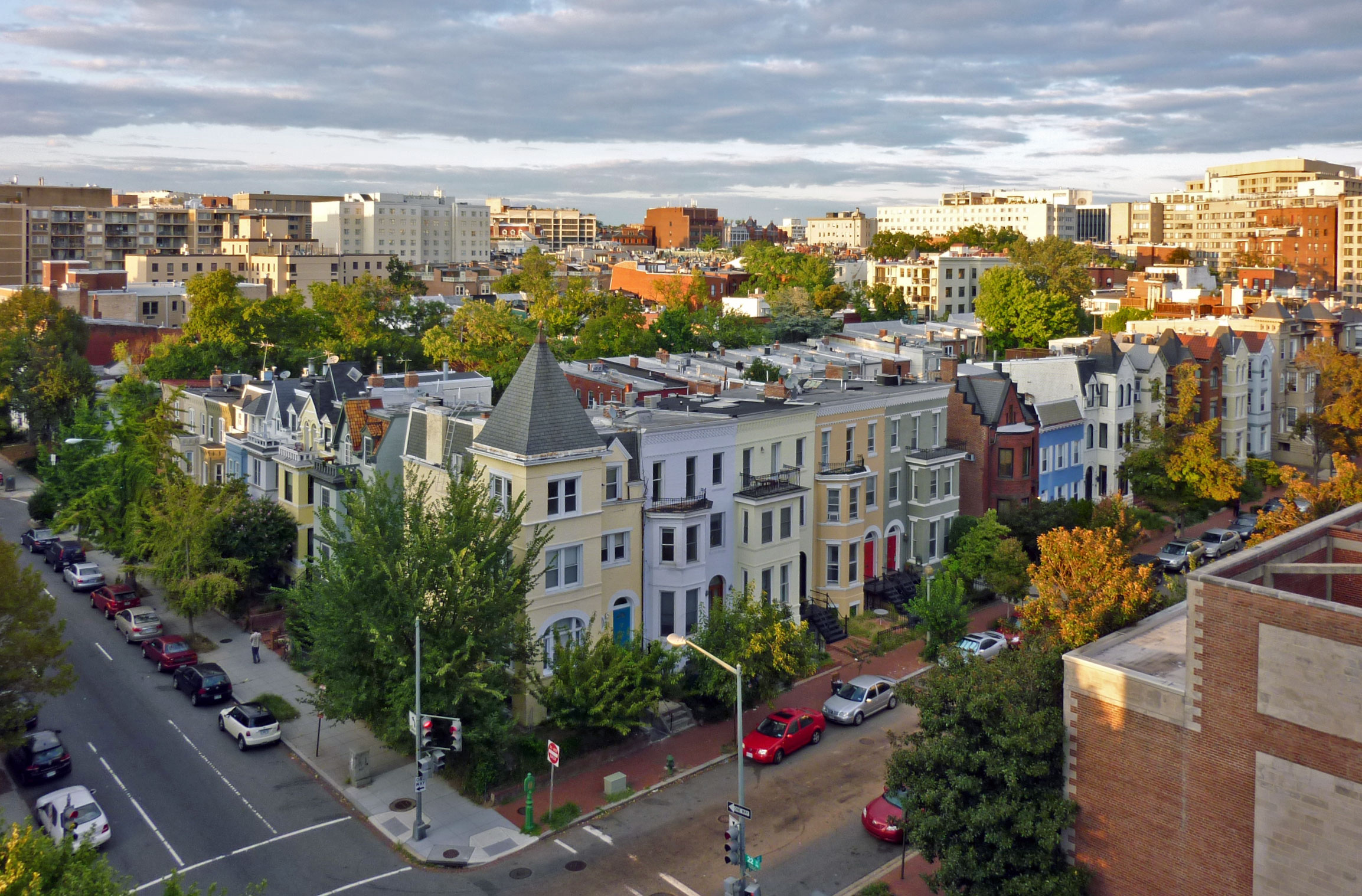 Sunset over DuPont Circle